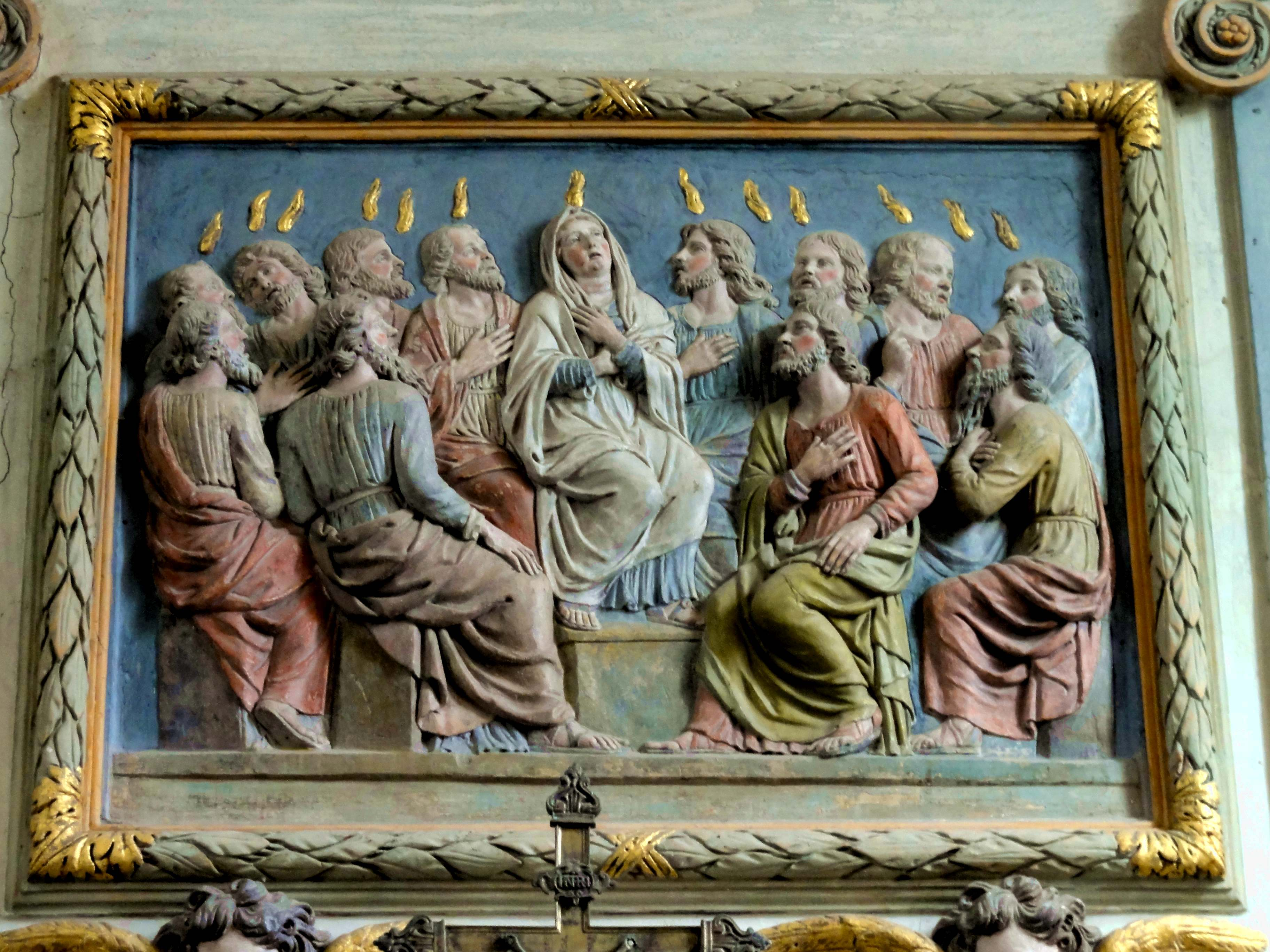 Retable du chevet, bas-relief - La Pentecôte, XVIIe siècle.